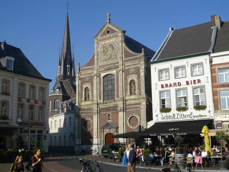 St Michael's church, Sittard